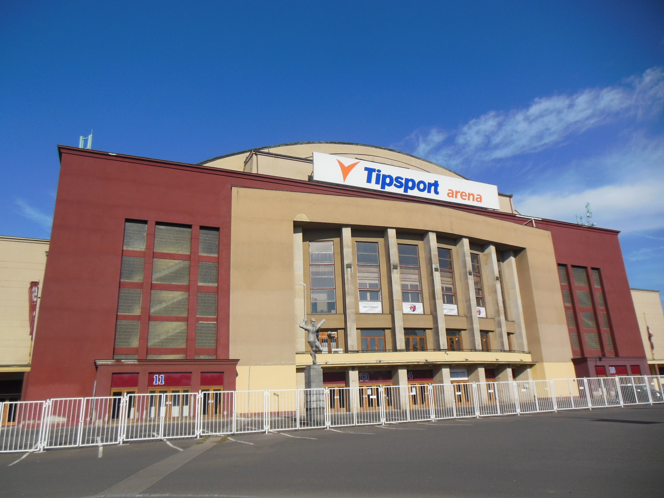 Tipsport arena v Praze-Bubenči.